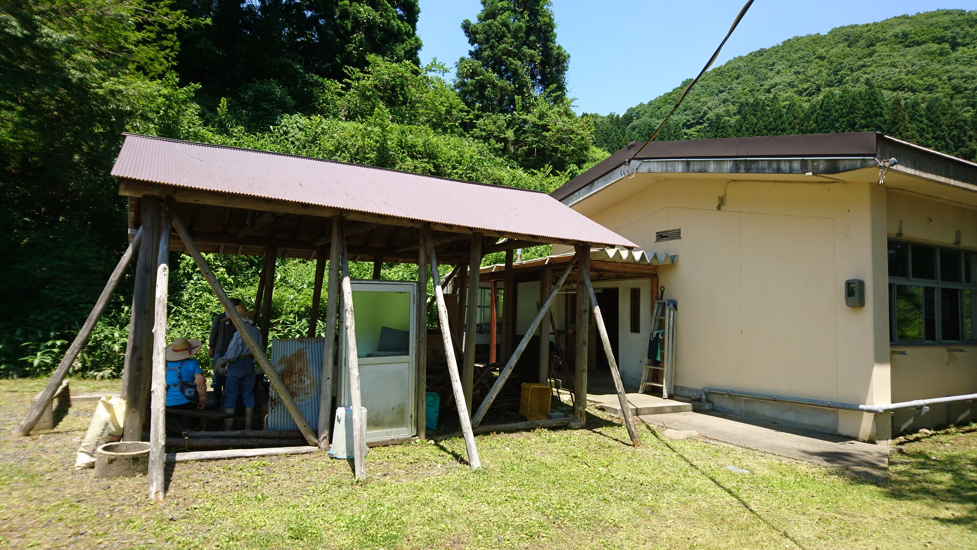 丹後の藤織りの伝承交流館